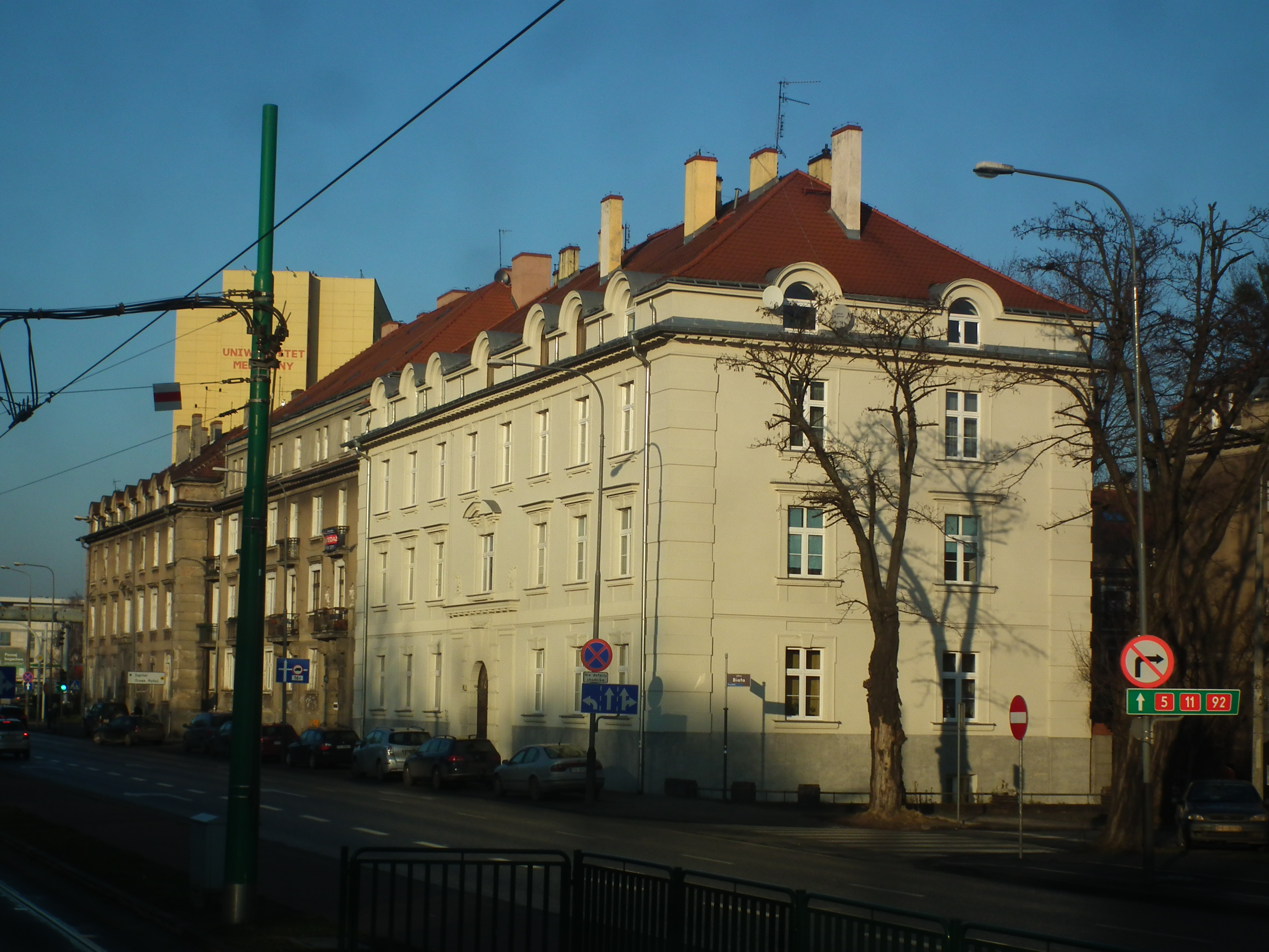 Osiedle urzędnicze Przybyszewskiego/Biała w Poznaniu.